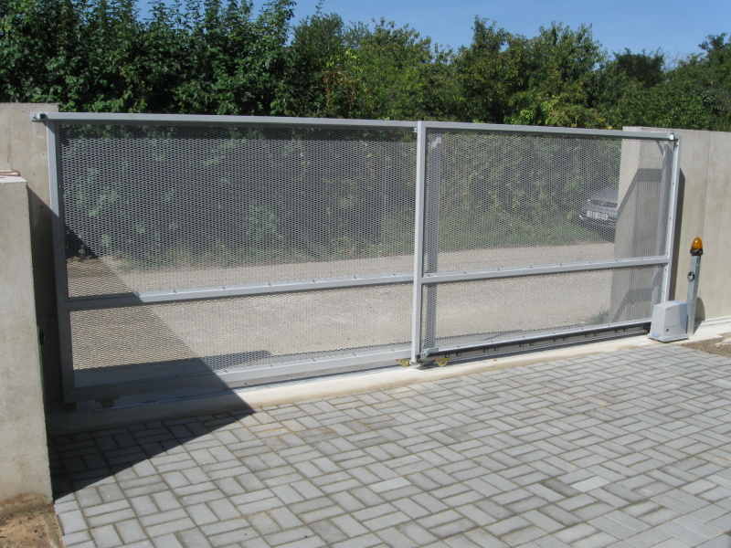 Dvojdílná teleskopická brána - první křídlo je poháněno pohonem, druhé křídlo mechanickým převodem.